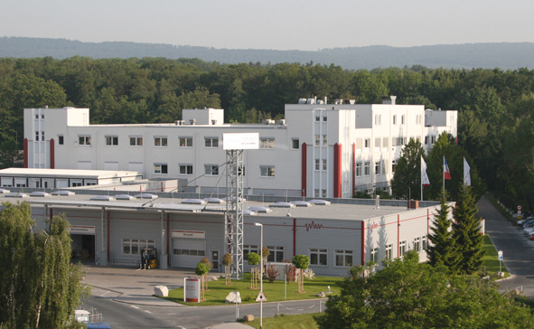 Hauptsitz der PEIKER acustic GmbH & Co. KG in Friedrichsdorf, Deutschland